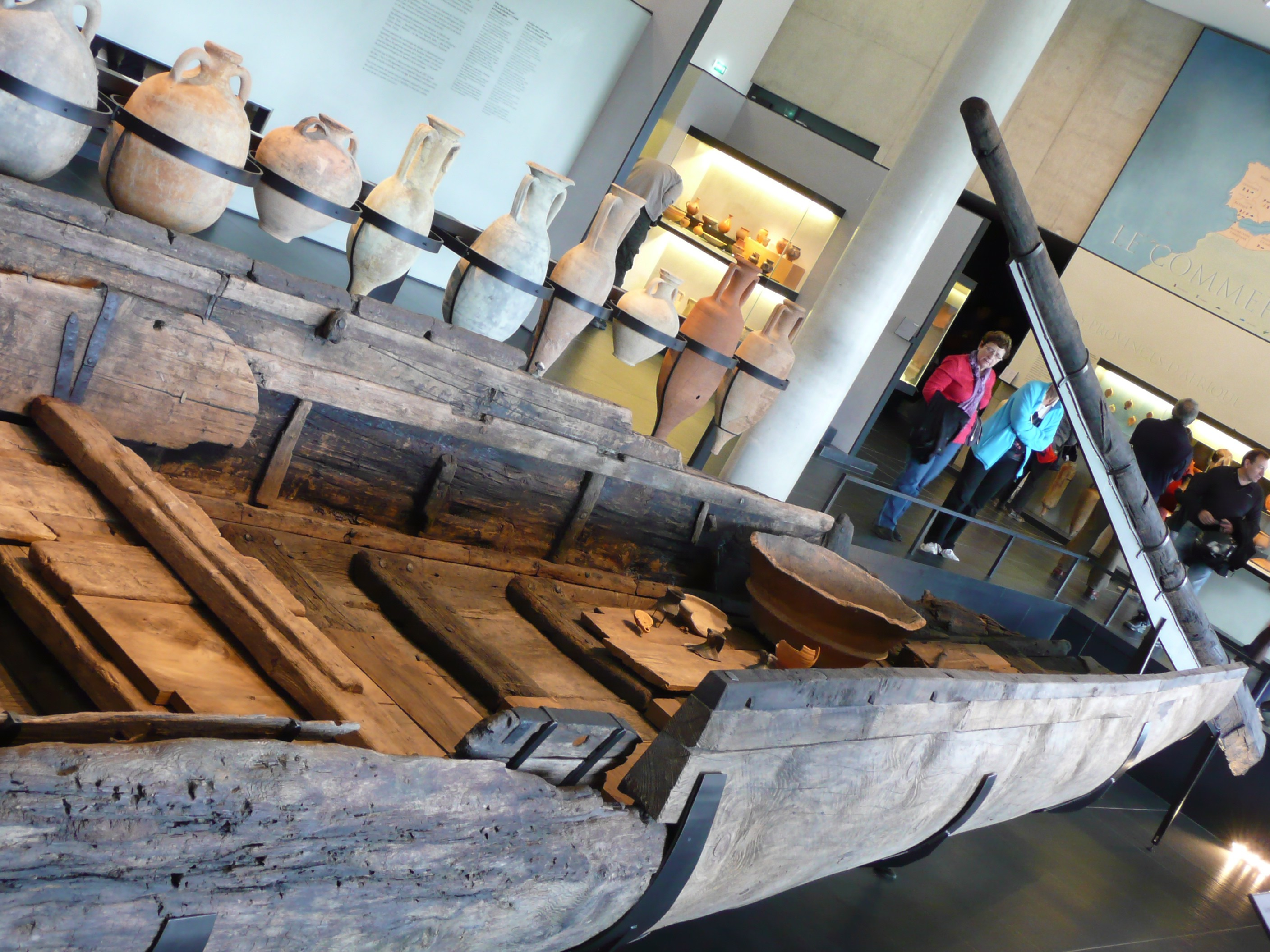 A Arles (Bouches-du-Rhône, France), au musée départemental de l'Arles antique (MD2A), chaland gallo-romain construit vers l'an 50, de 31 mètres de long pour 3 de large, découvert en 2004 par Luc Long, et sorti de l'eau durant l'été et l'automne 2011 sous la direction de Sabrina Marlier, présenté dans une extension du musée inaugurée le 04 octobre 2013.